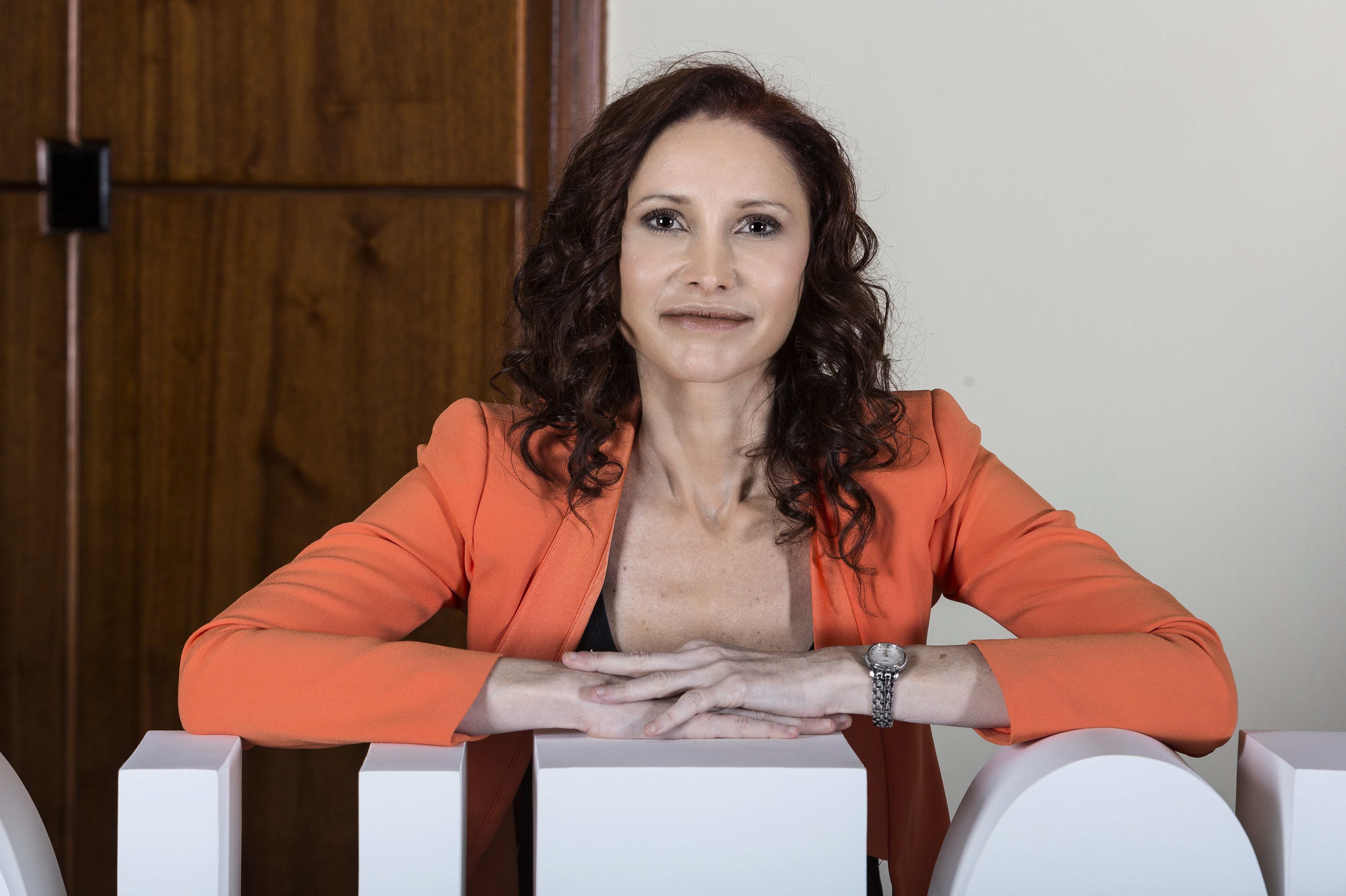 Natalia Pasternak Taschner em 22-11-2018